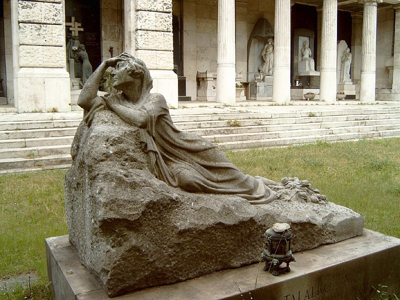 Tarcsay Vilmos (Érsekújvár, 1901. júl. 22. – Bp., 1944. dec. 8.): vezérkari százados sírja Budapesten. Kerepesi temető: Á. B. út [Szobrász: Somló Sári].